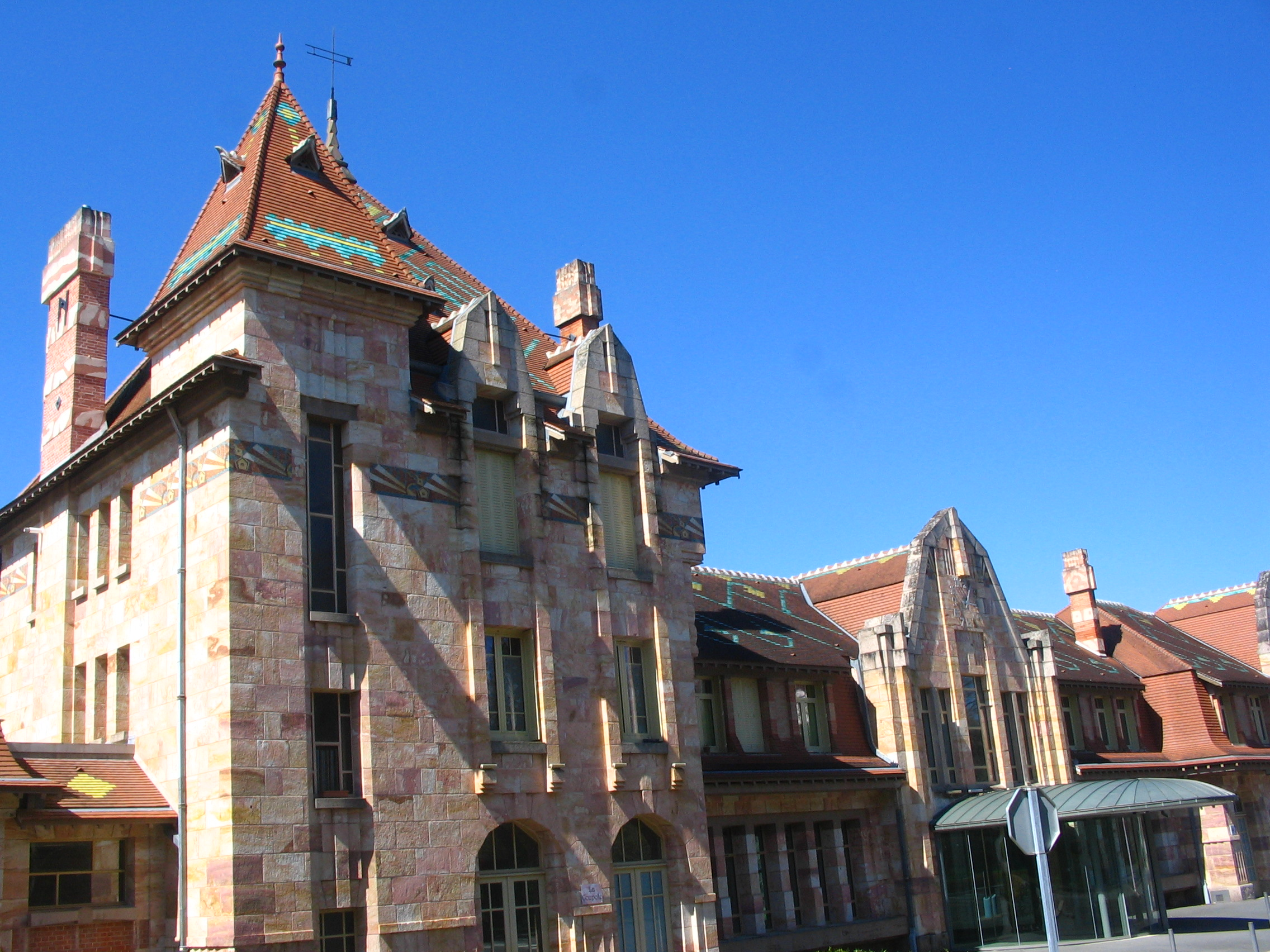 Le Pavillon du Lac, ancienne gare de Néris les Bains (03) convertie en centre de congrès. La façade date de 1931.